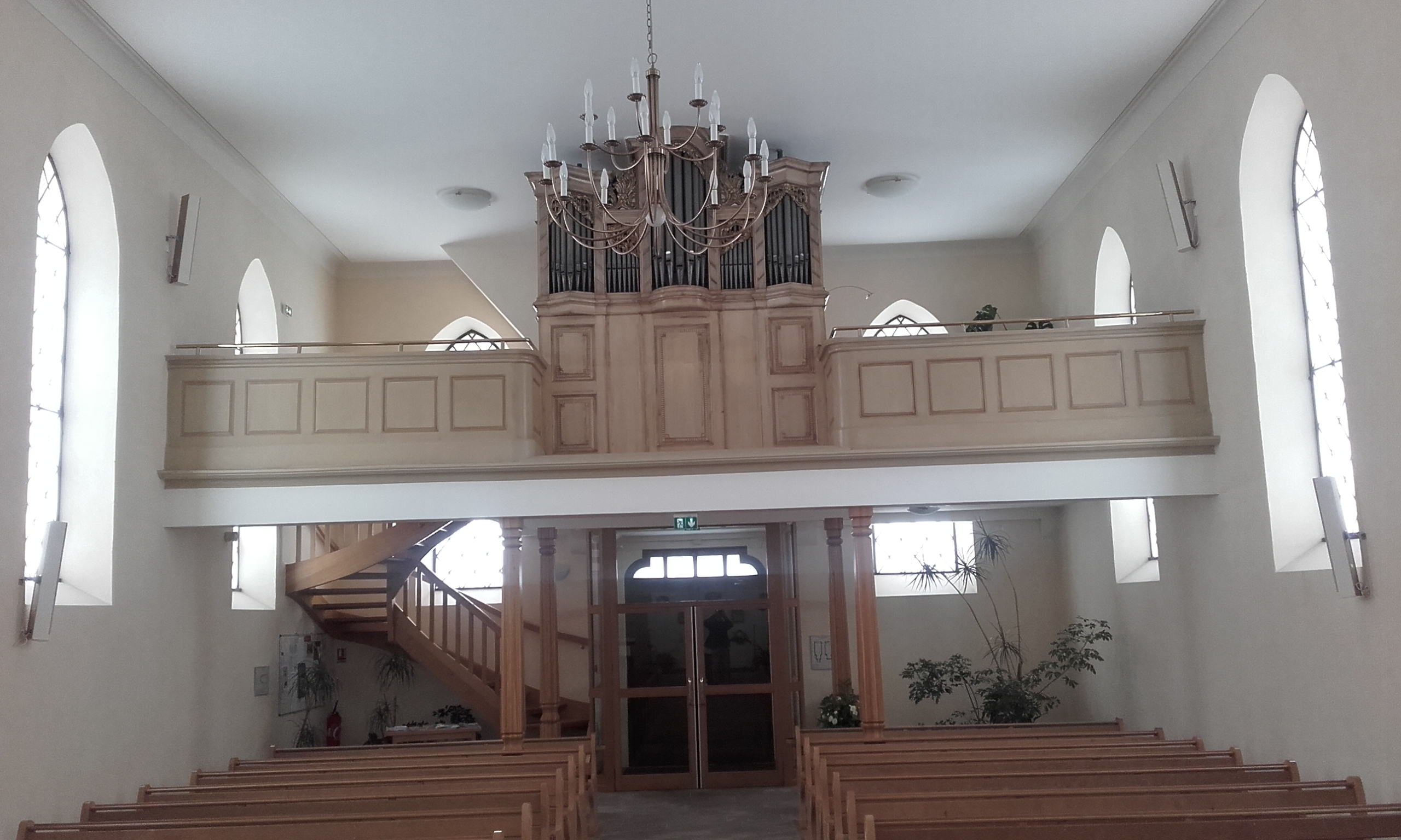 Bas-Rhin, Morsbronn-les-Bains, entrée et tribune de l'orgue de l'église de la Toussaint. L'orgue dont le buffet date du XVIIIe siècle provient d'une église du Palatinat et a été acquis par les deux paroisses en 1878 au facteur d'orgues Voit et fils de Durlach (Allemagne). L'instrument est composé de parties anciennes et d'éléments fournis par Voit en 1878.